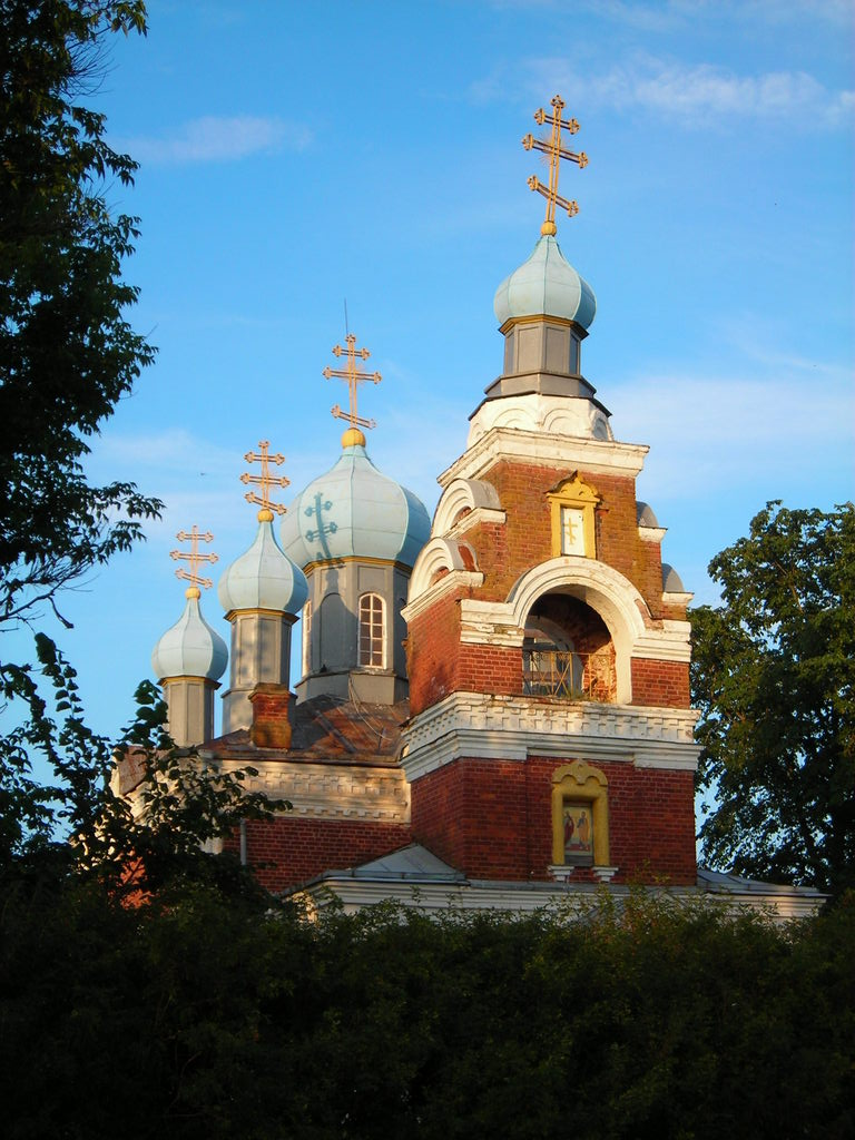 Беларуская (тарашкевіца): Петрапаўлаўская царква ў Дрвсьвятах на Браслаўшчыне пабудавана ў 1908 годзе. This is a photo of Belarusian heritage monument. Reference number: 213Г000189 ( WLM)